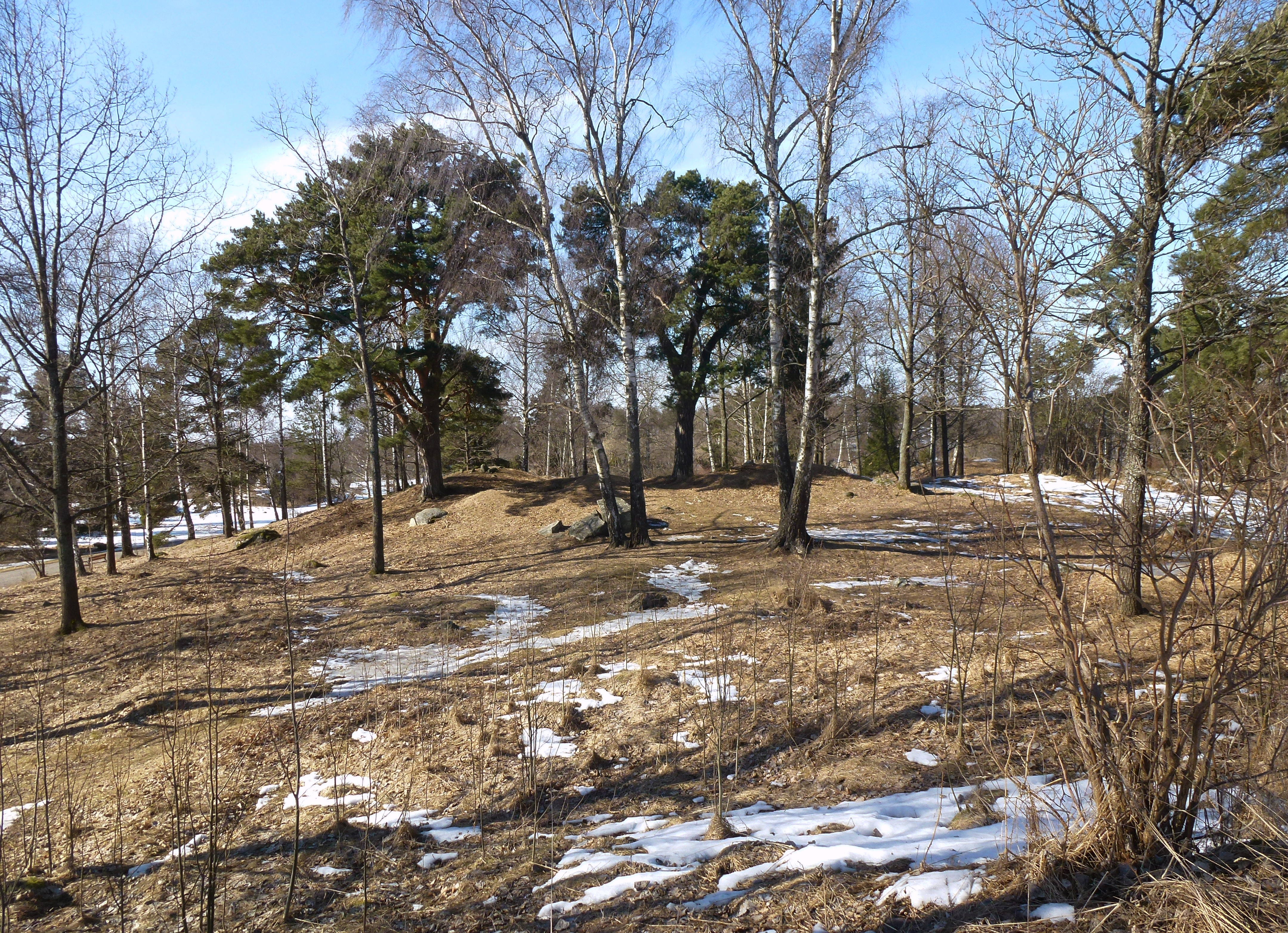 Kälvesta gravhögar 2013 (RAÄ-nummer Spånga 44:1) är Stockholms kommuns största gravfält bestående av ca 145 fornlämningar.Dessa utgöres av 11 högar, ca 120 runda stensättningar, minst 1 kvadratisk stensättning, 8 rektangulära stensättningar, 2 treuddar och tre skeppsformiga stensättningar.